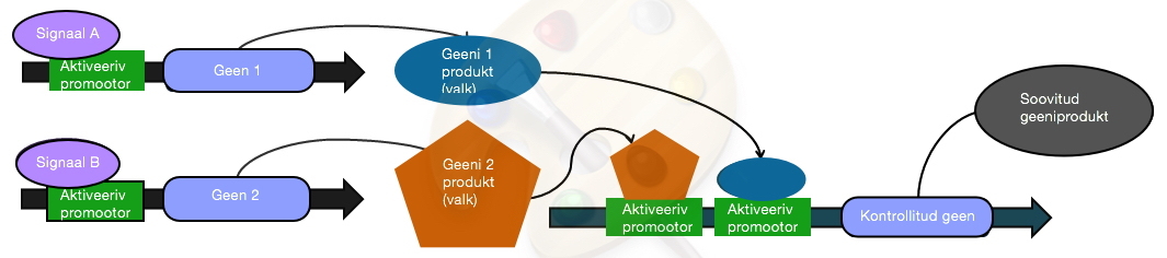 Loogikavärav OR